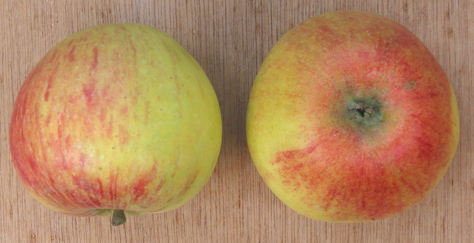 Alkmene apple